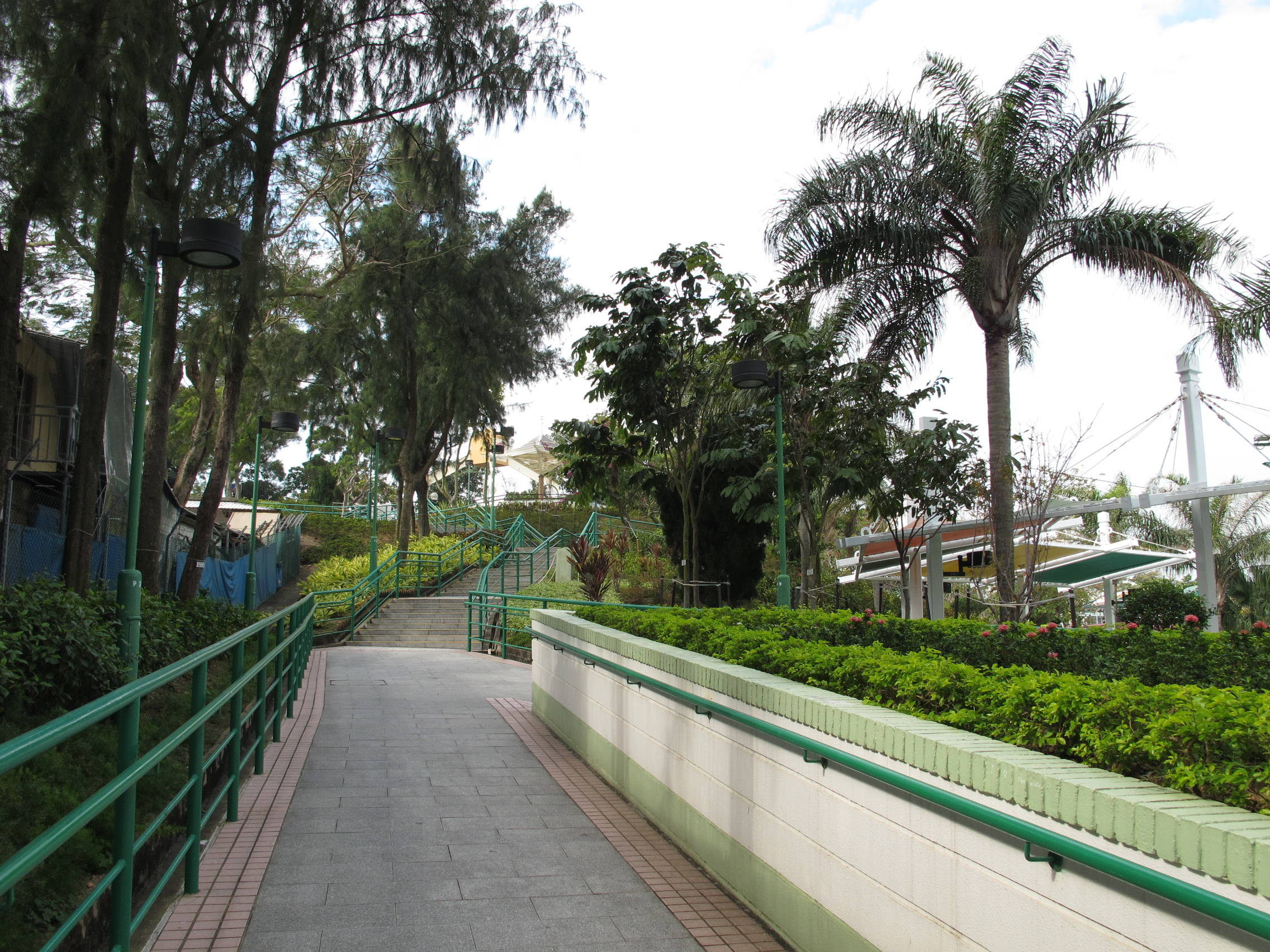 Cheung Chau Park